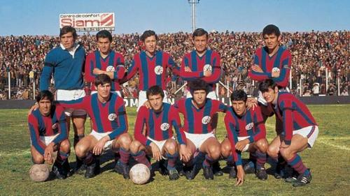 Formación de Los Matadores